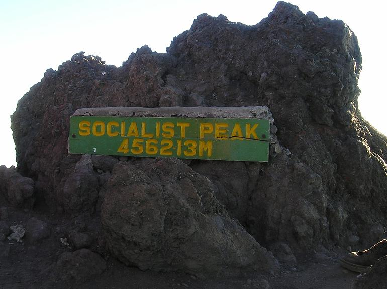 Image du sommet du mont Méru (Tanzanie) aussi appelé Socialist Peak Photo prise par utilisateur Galano en février 2006